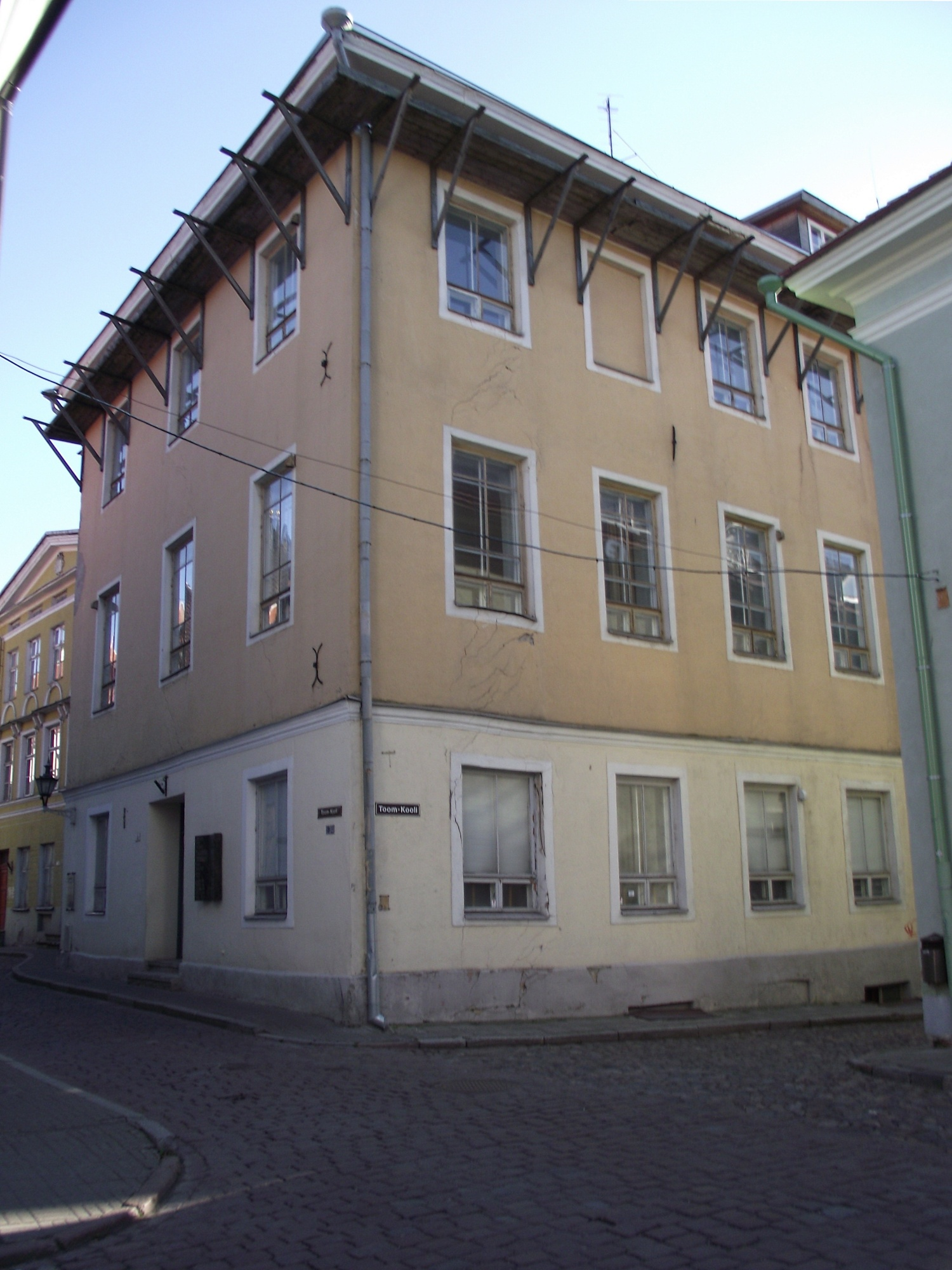 Tallinna Toomkooli hoone aadressil Toom-Kooli 11.